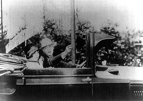 『女房紛失』、1928年、スチル写真